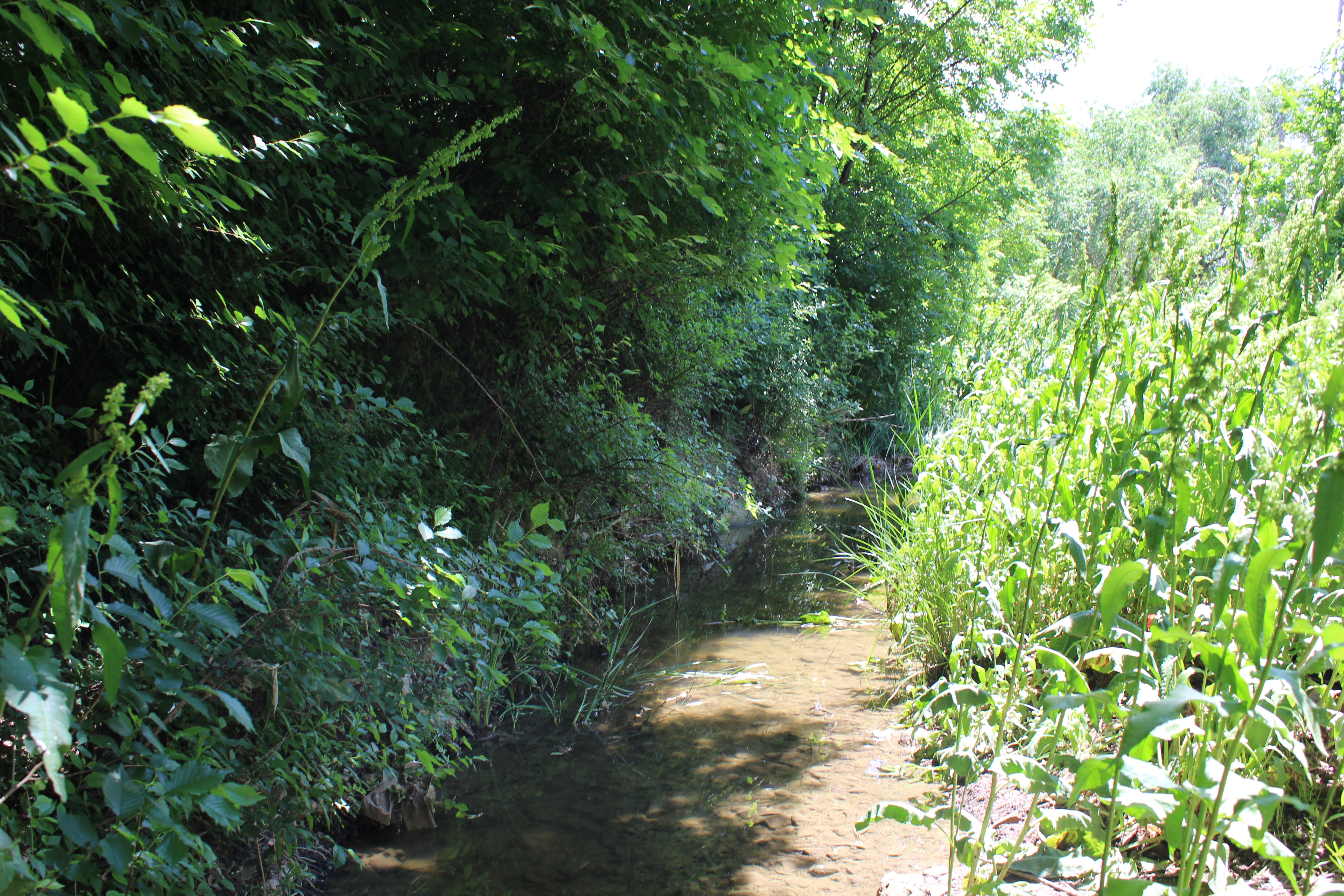 Arroyo del Monte (Daganzo de Arriba).